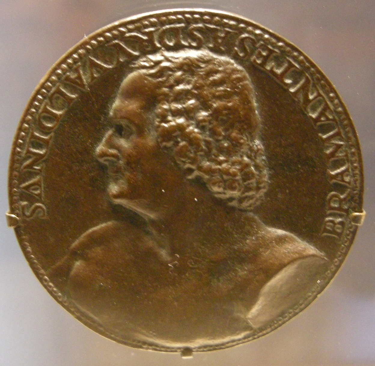 Donato Bramante, 1506 c., verso